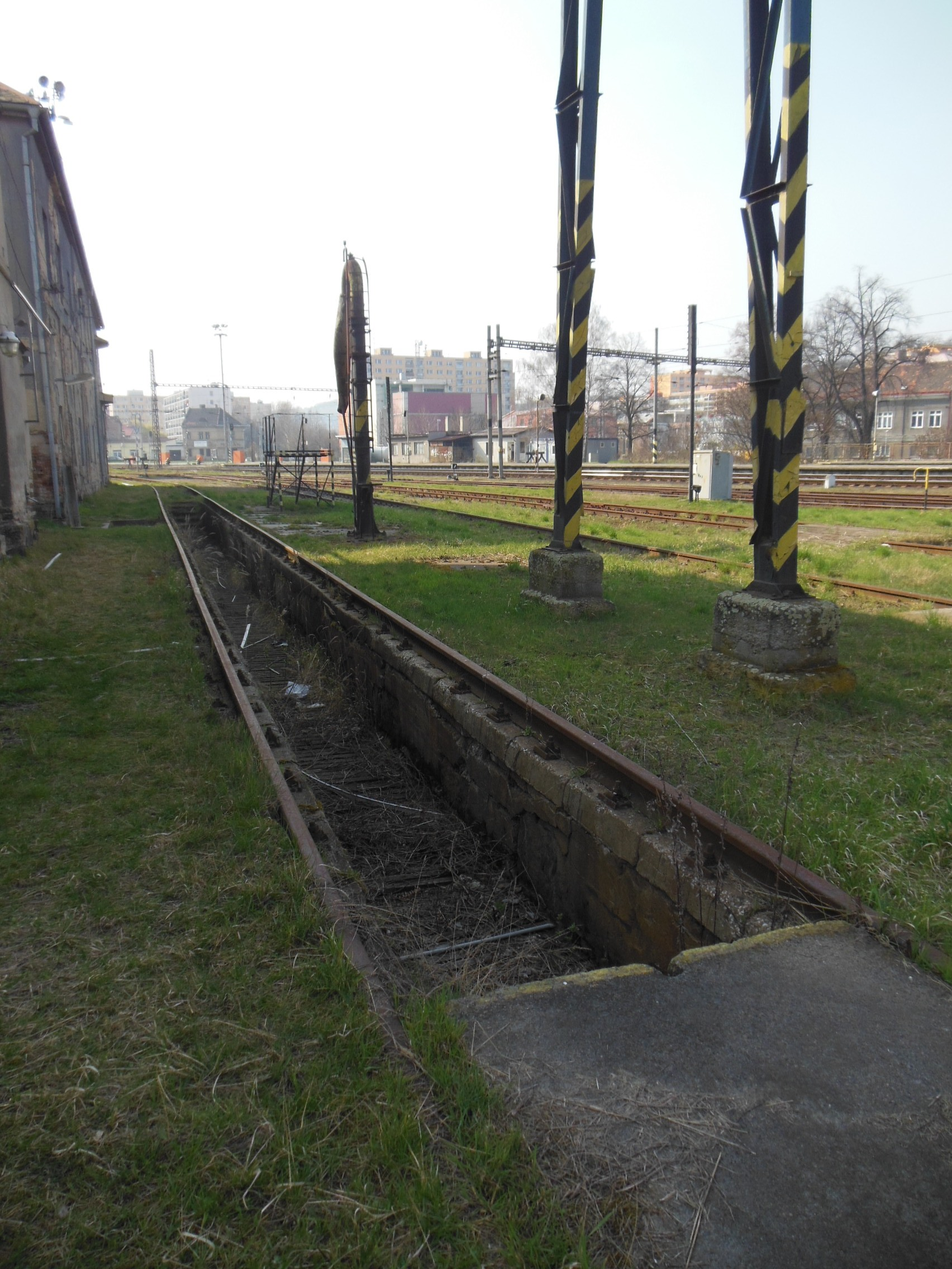 Kralupy nad Vltavou (okres Mělník). Popelová jáma v železničním depu u č. p. 26